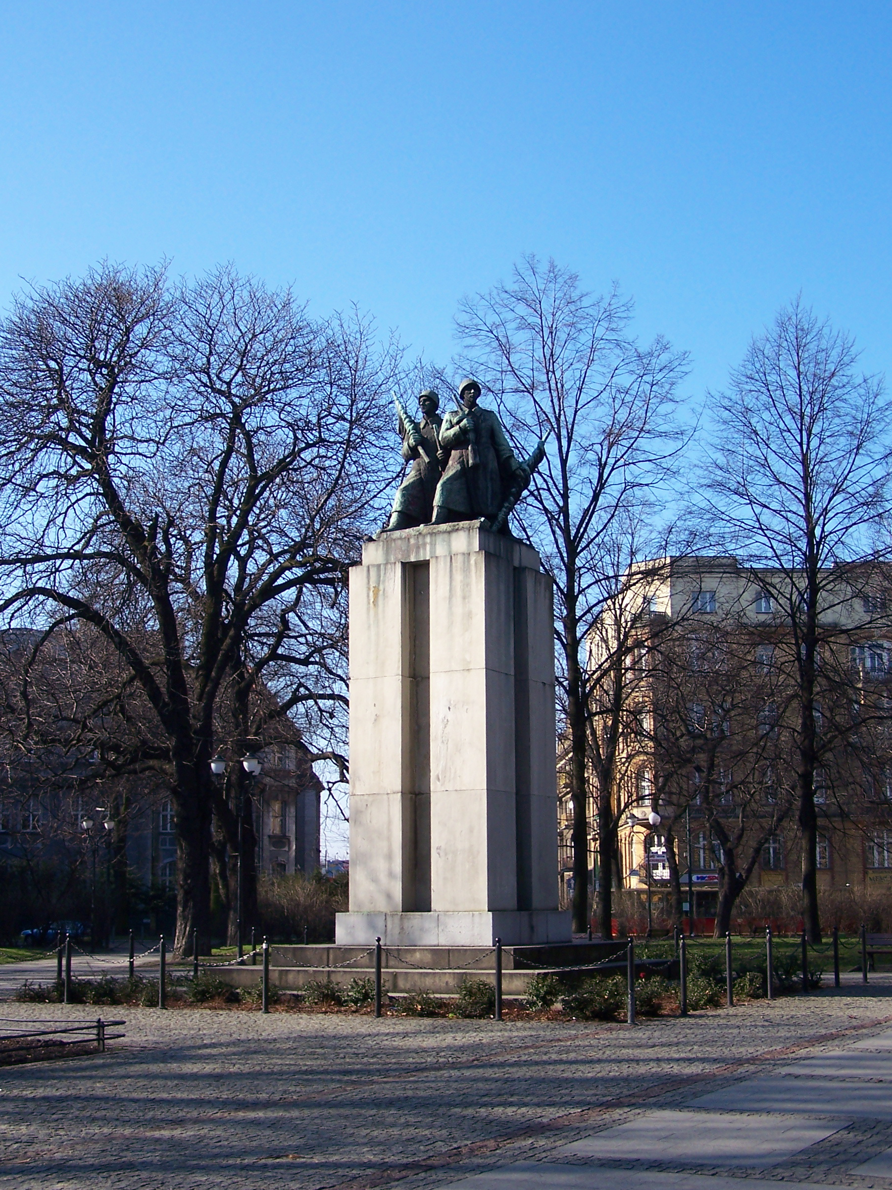 Pomnik żołnierzy radzieckich na Placu Wolności w Katowicach.